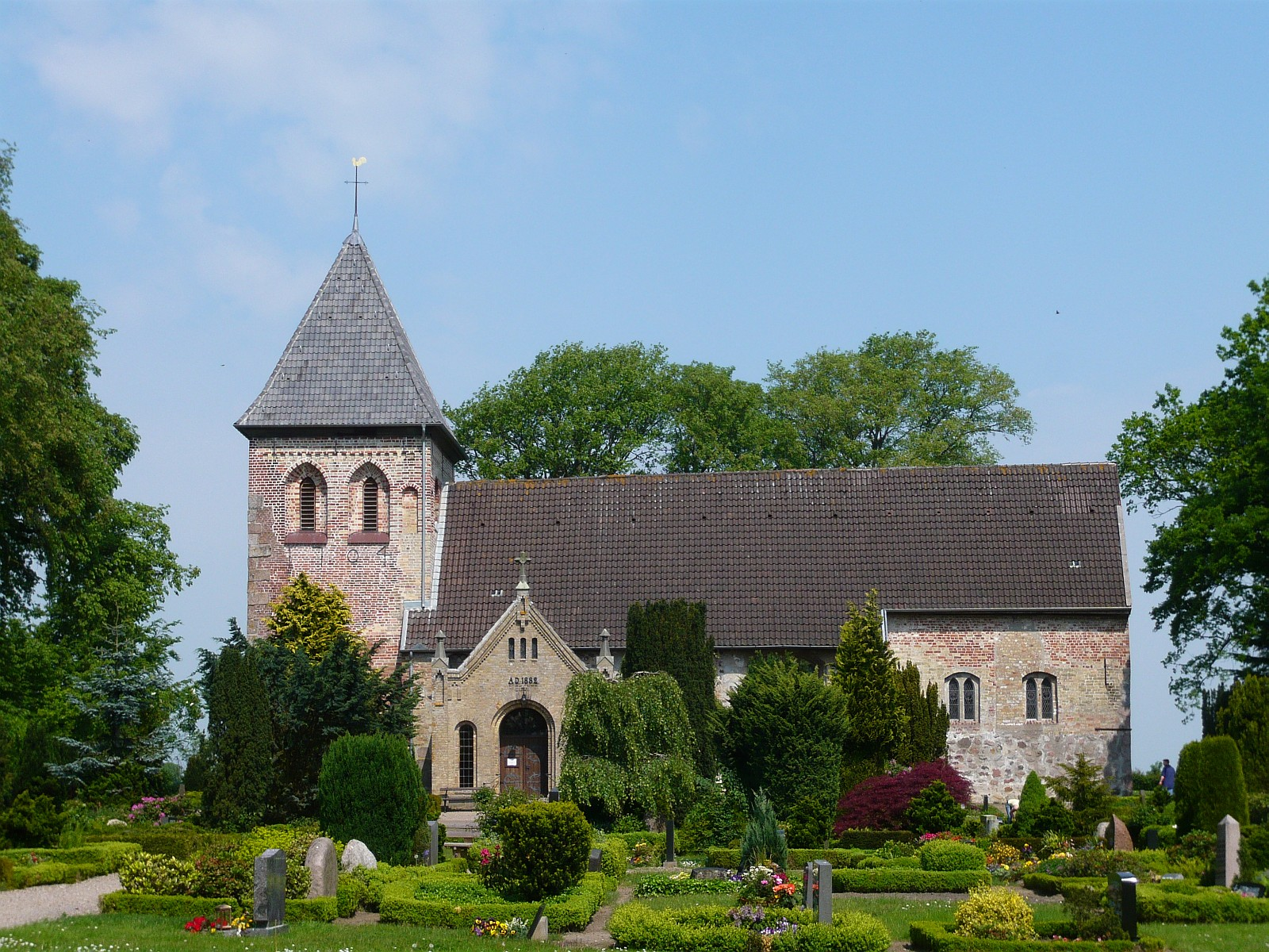 Marienkirche in Rabenkirchen.